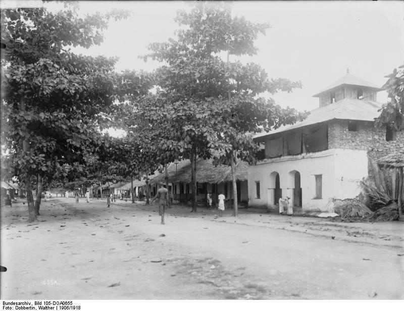 Pangani, Breite Strasse